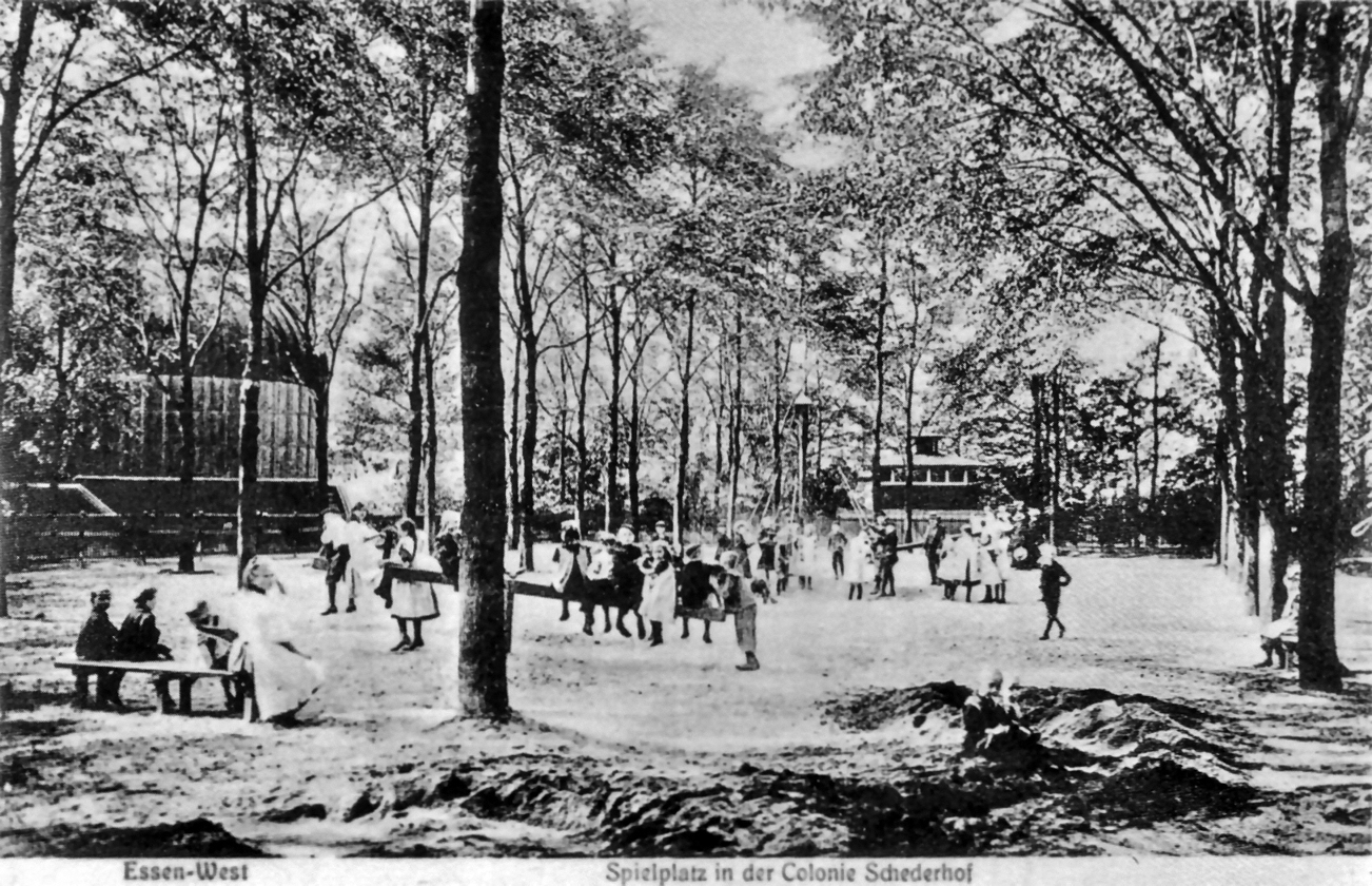 Spielplatz der Krupp´schen Arbeiterkolonie Schederhif im Westen von Essen